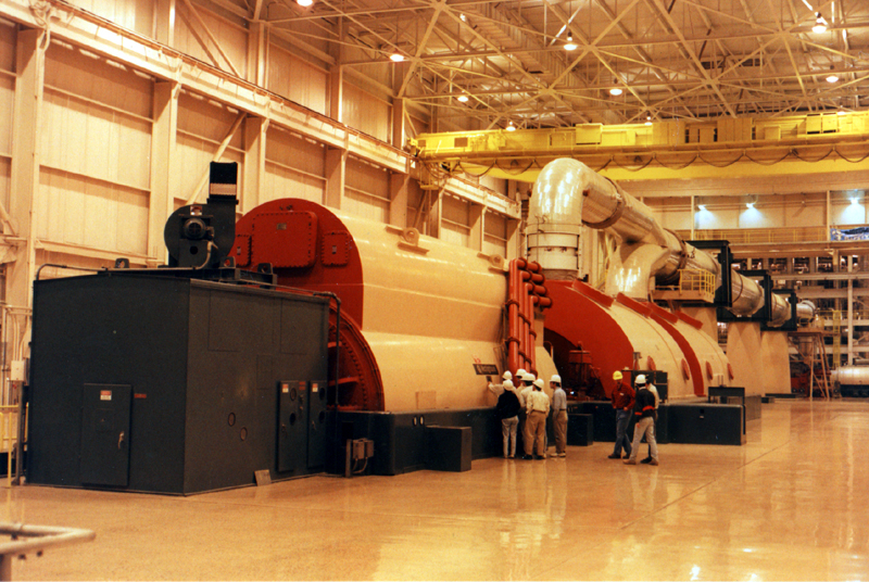 93-01-xx, Zimmer Power Plant, Generator and Turbine